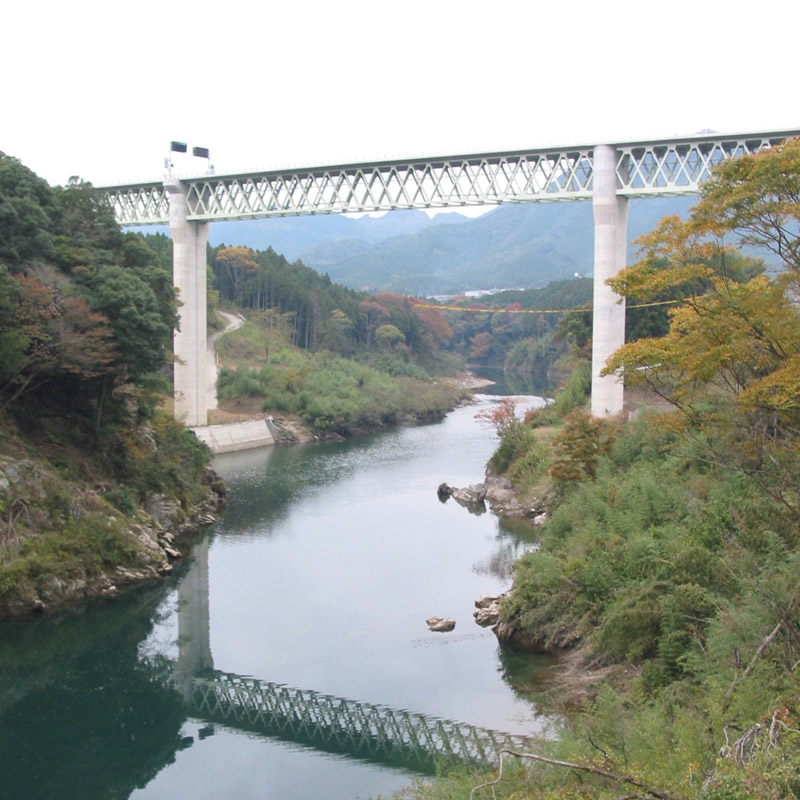 三重県多気郡大台町と度会郡大紀町の間に架かる紀勢自動車道紀勢宮川橋。